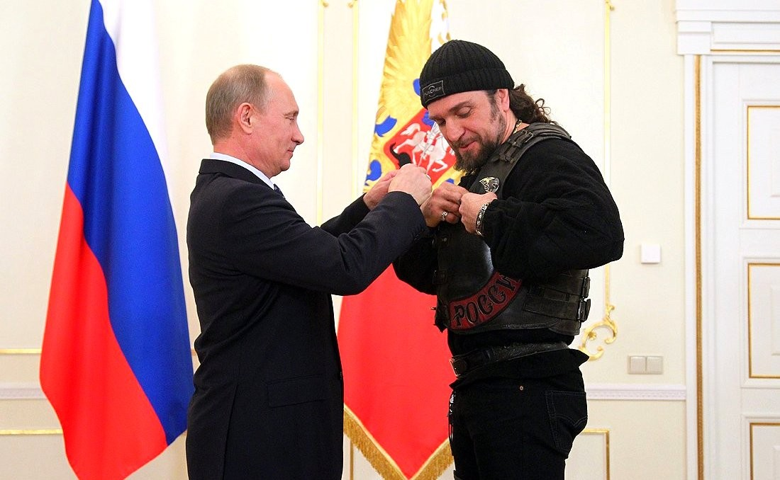 Вручение государственных наград. Орденом Почёта награждён руководитель Всероссийского мотоклуба Александр Залдостанов